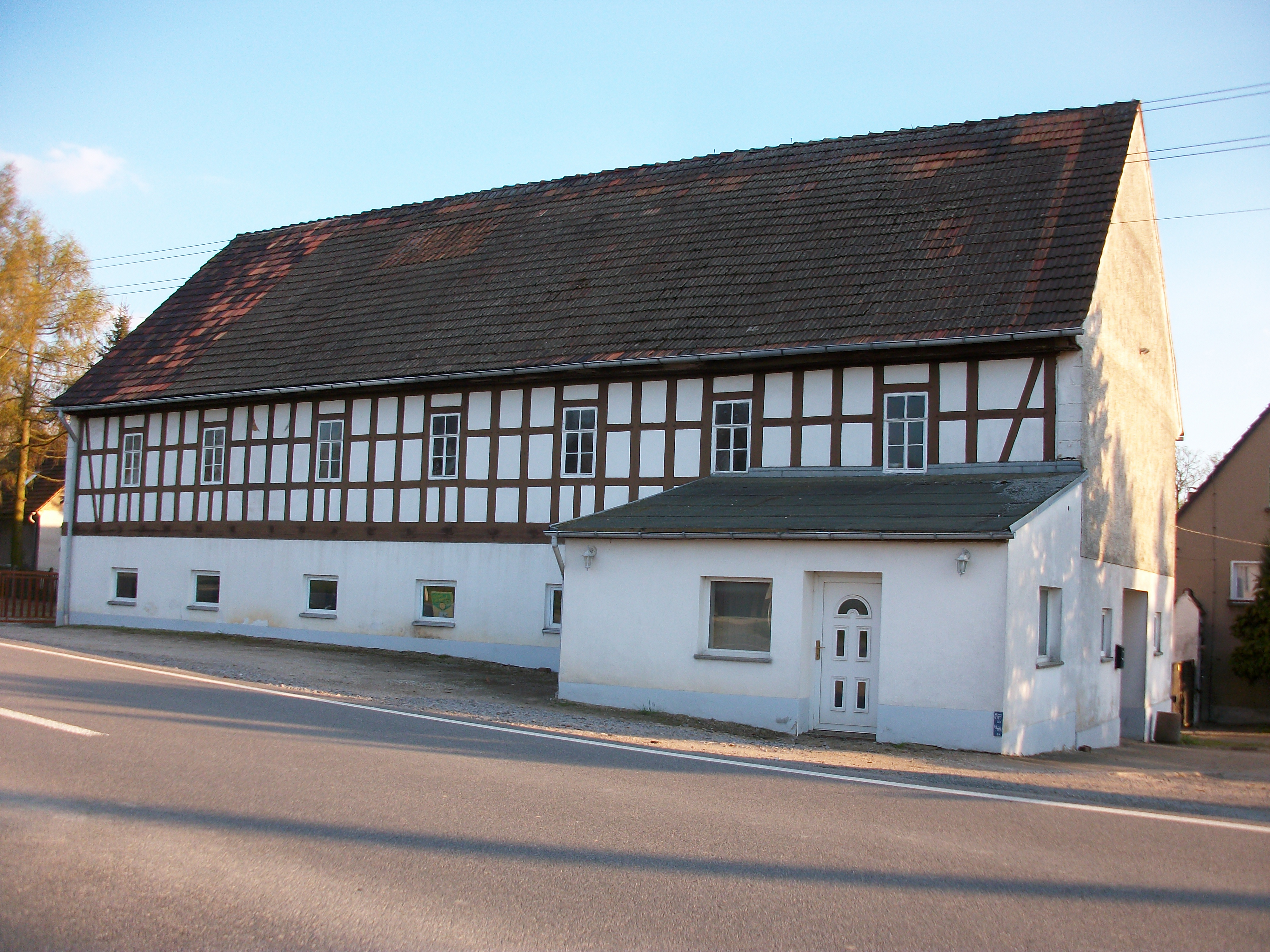 Wickersdorf, Hohe Straße 11